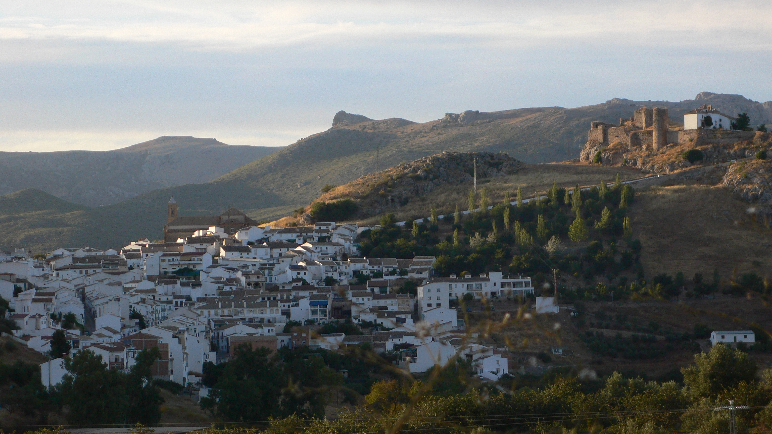 carcabuey